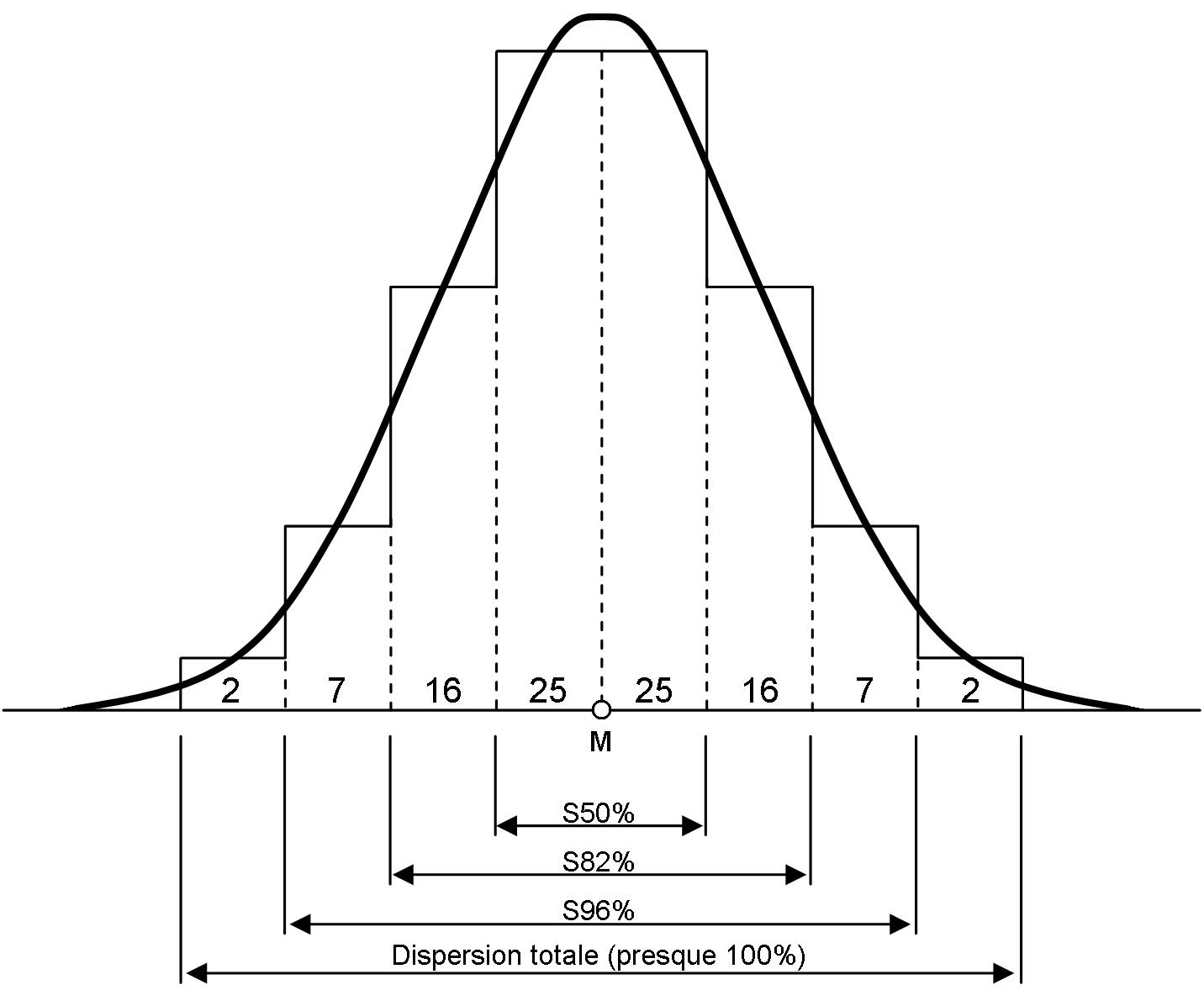 Répartition idéale (courbe de Gauss)